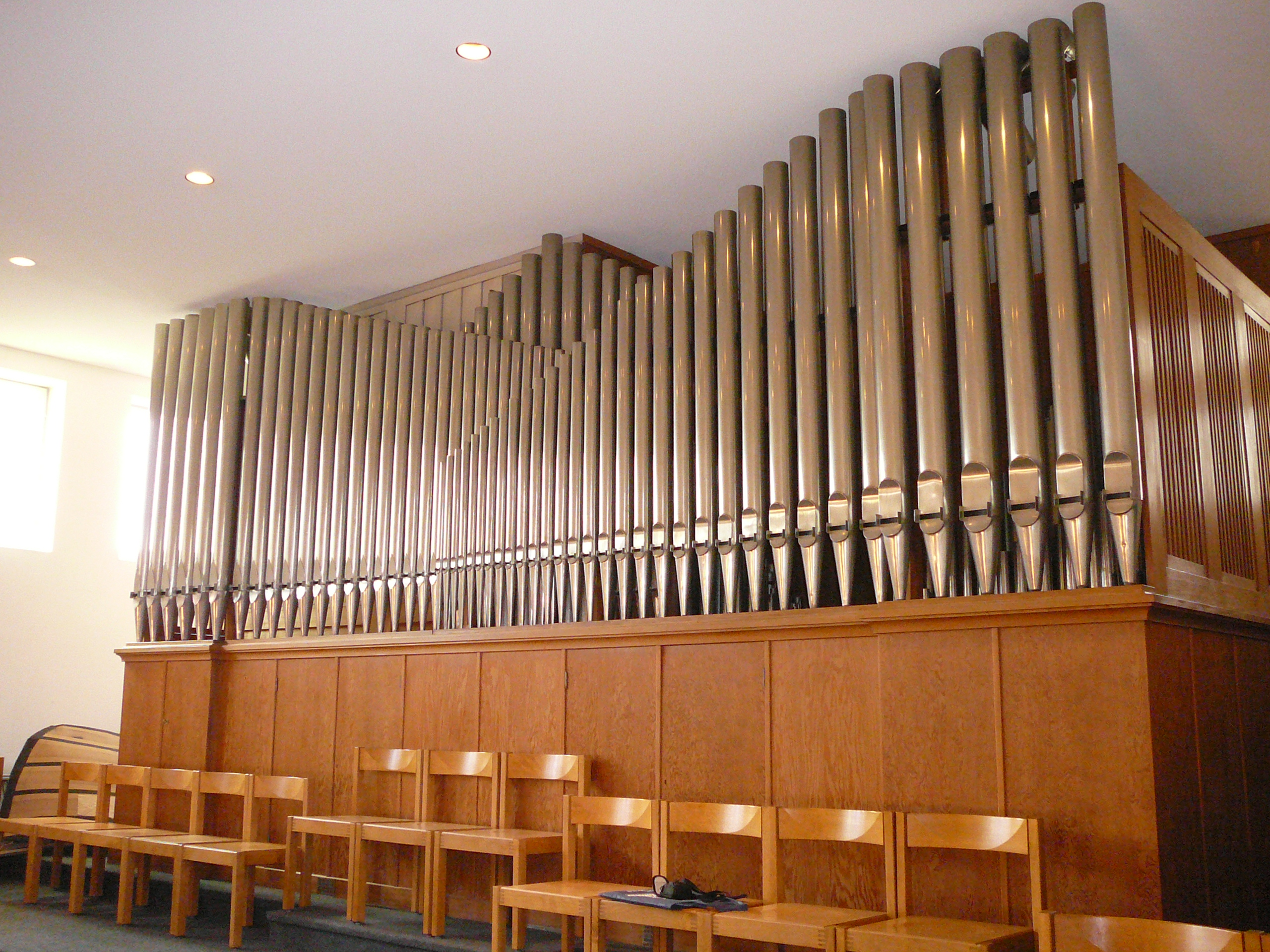 Römisch-katholische Kirche St. Theresia Zürich Orgel